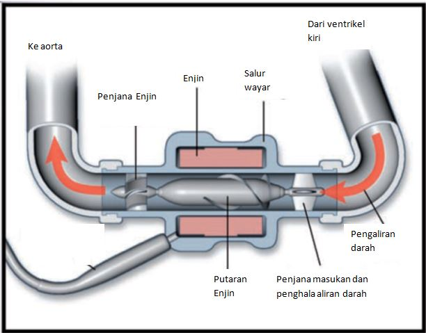 Darah mengalir dari ventrikel kiri untuk pemutar selepas melalui penjana masuk yang mengurangkan pergolakan. Ia kemudian melalui pemegun cawangan dan melalui kanula aliran keluar yang dimasukkan ke dalam aorta menaik.